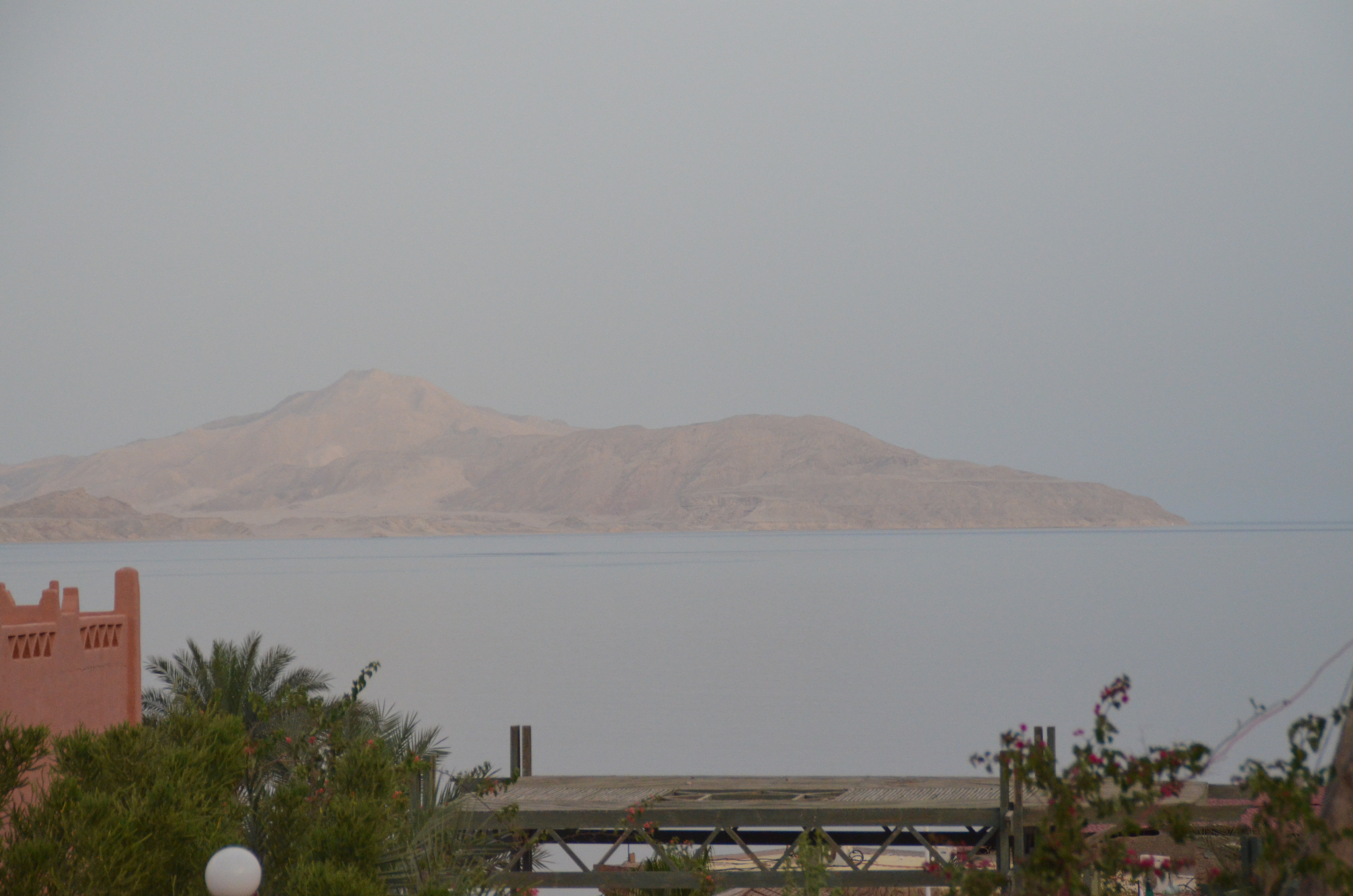 جزيرة تيران ، الجانب المواجهة لمدينة شرم الشيخ